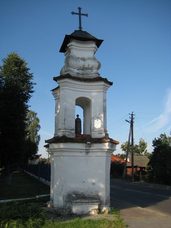 Краявіды Слоніма